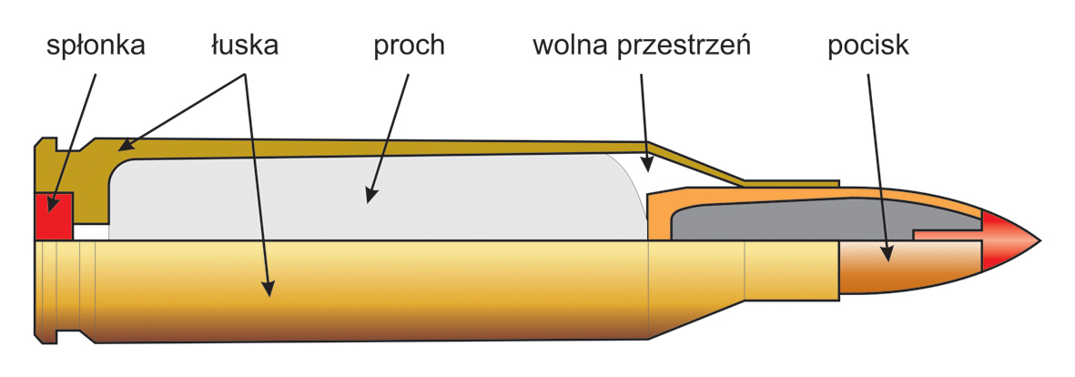 Budowa naboju kulowego